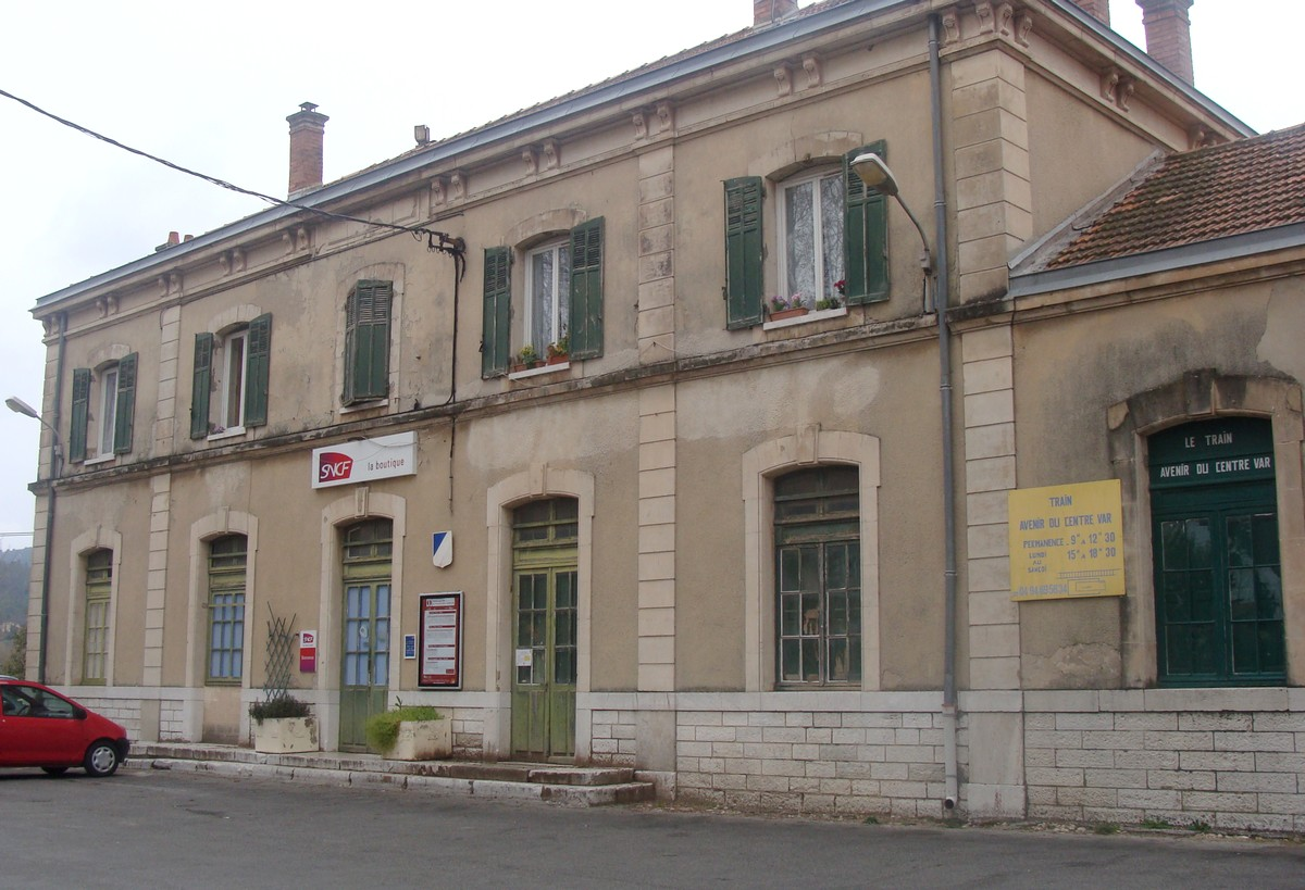 La gare de Brignoles (Var), sur la ligne Gardanne - Carnoules ; état actuel.